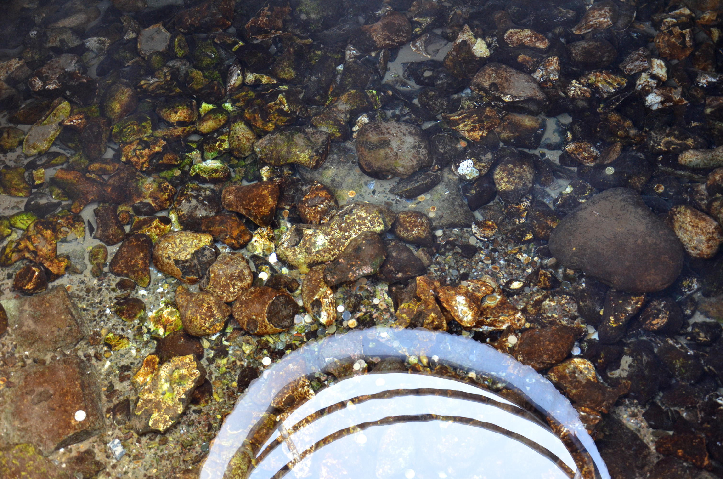 Гідрологічна пам'ятка природи «Джерело Пресвятої Трійці» в смт Велика Березовиця Тернопільського району Тернопільської області.